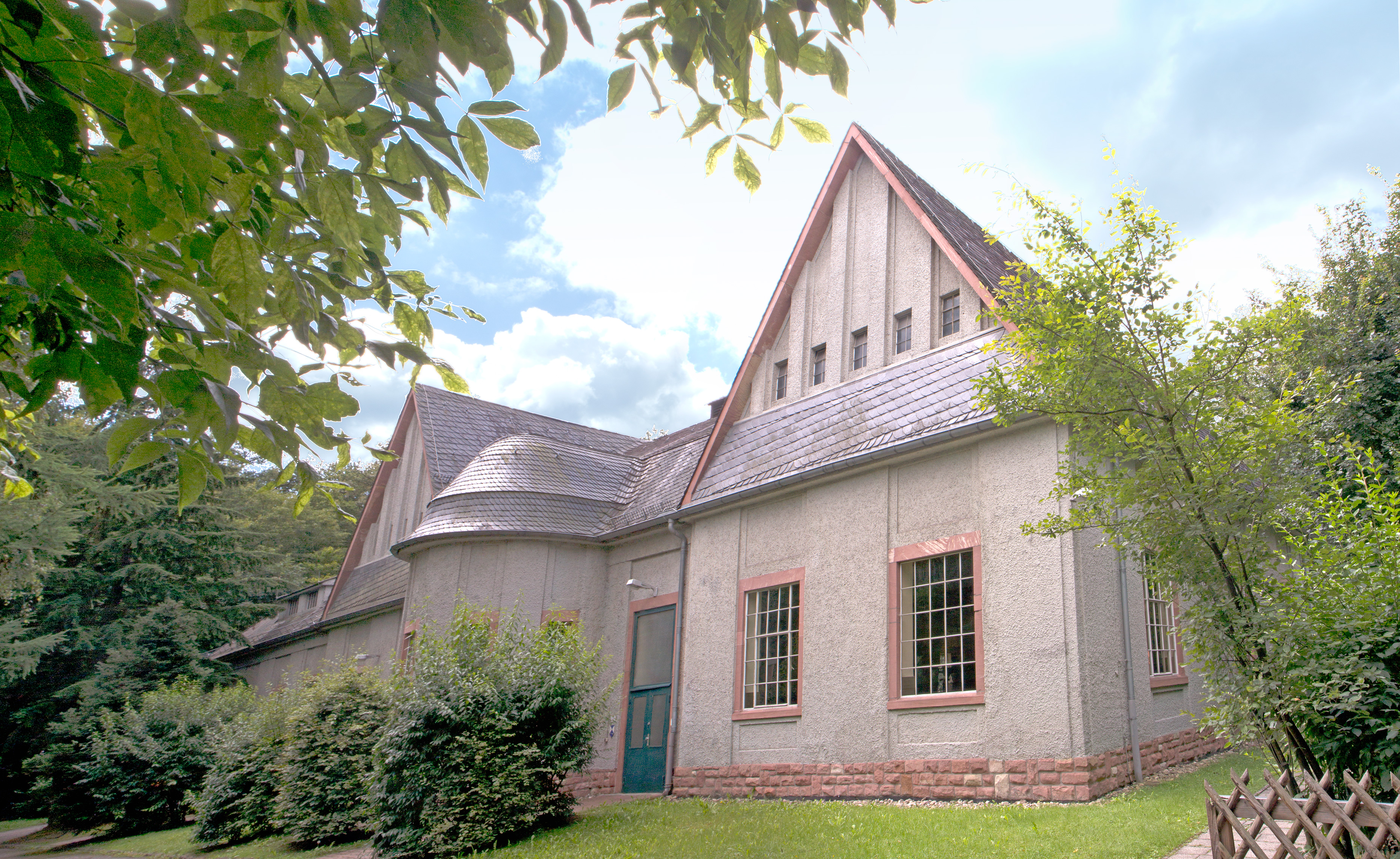 Wasserwerk III in Hanau-Kesselstadt (Hessen)